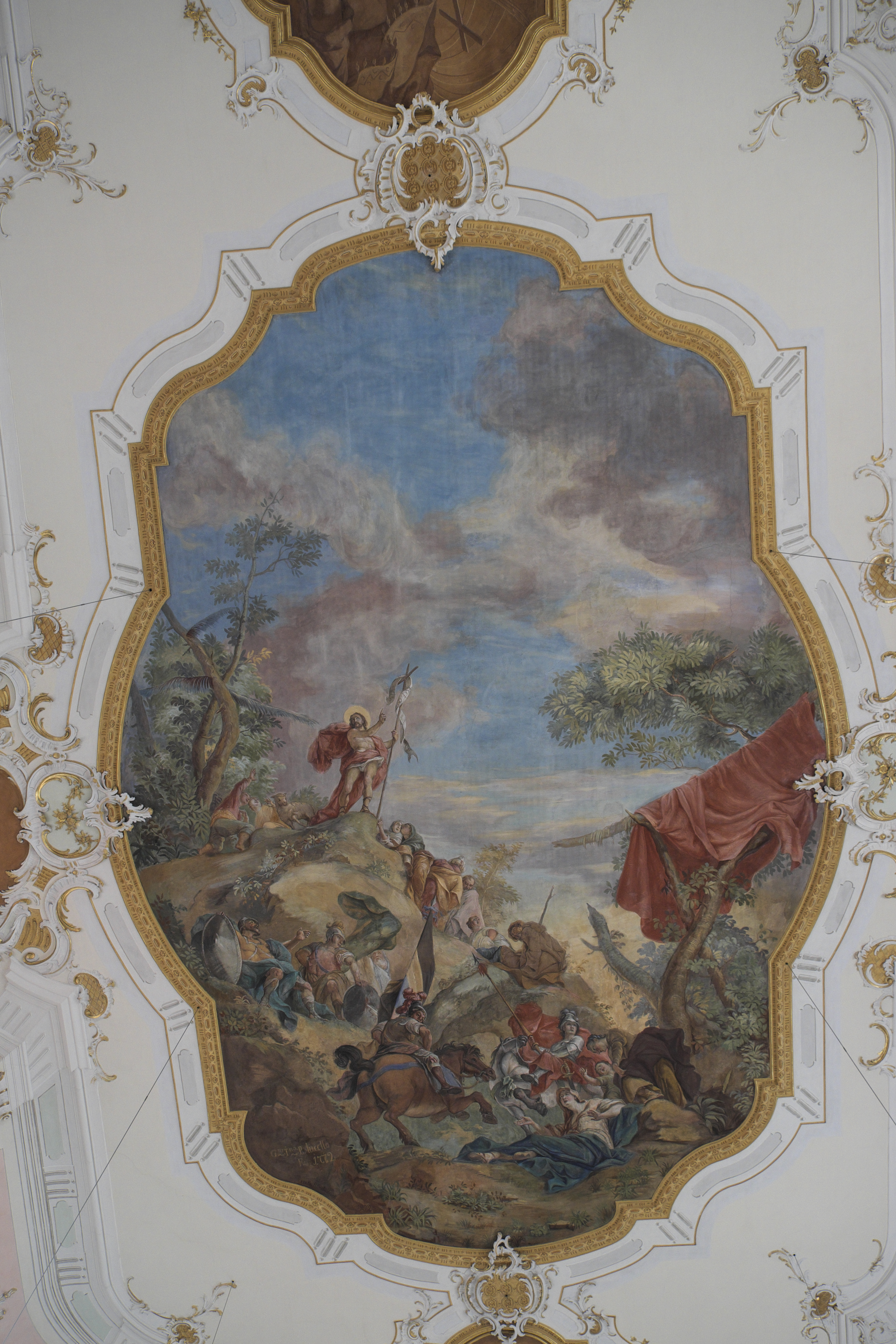 Katholische Pfarrkirche St. Johannes Baptist in Dischingen (Landkreis Heidenheim/Baden-Württemberg), Langhausfresko von Gabriel P. Lucello, von 1772, Darstellung: Predigt von Johannes dem Täufer, mit Signatur